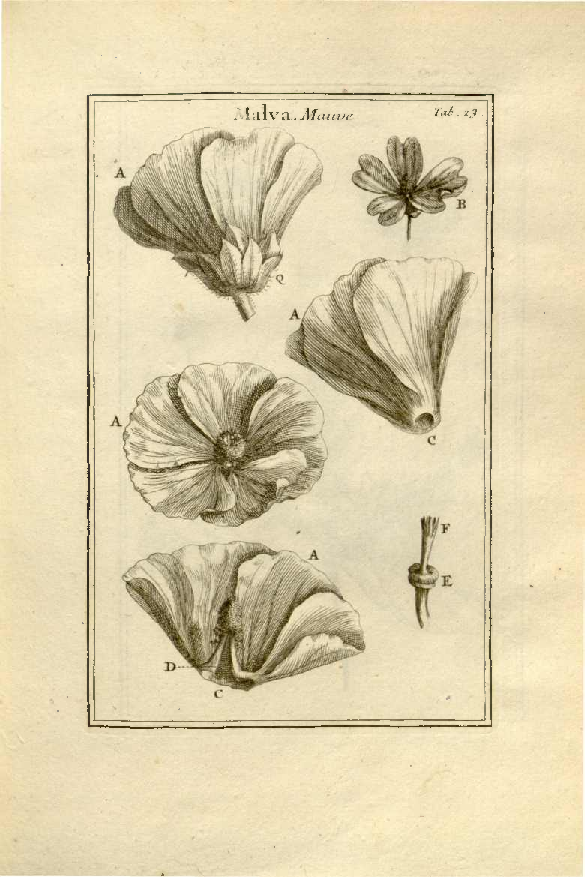 Institutiones rei herbariæ